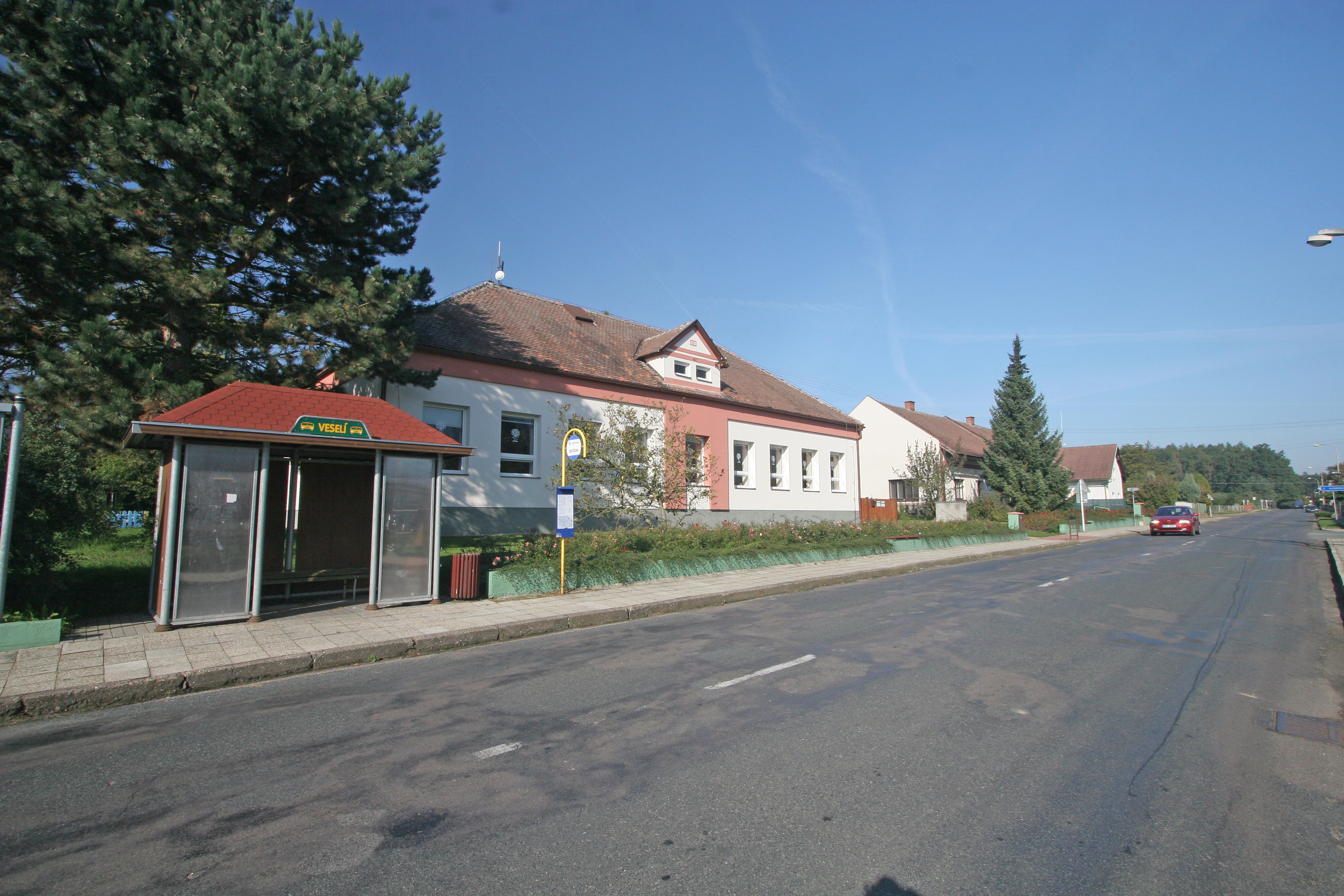 Veselí mateřská školka